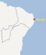 Edição que ilustra possível mapa da Confederação do Equador, que formaria um país independente do Brasil.